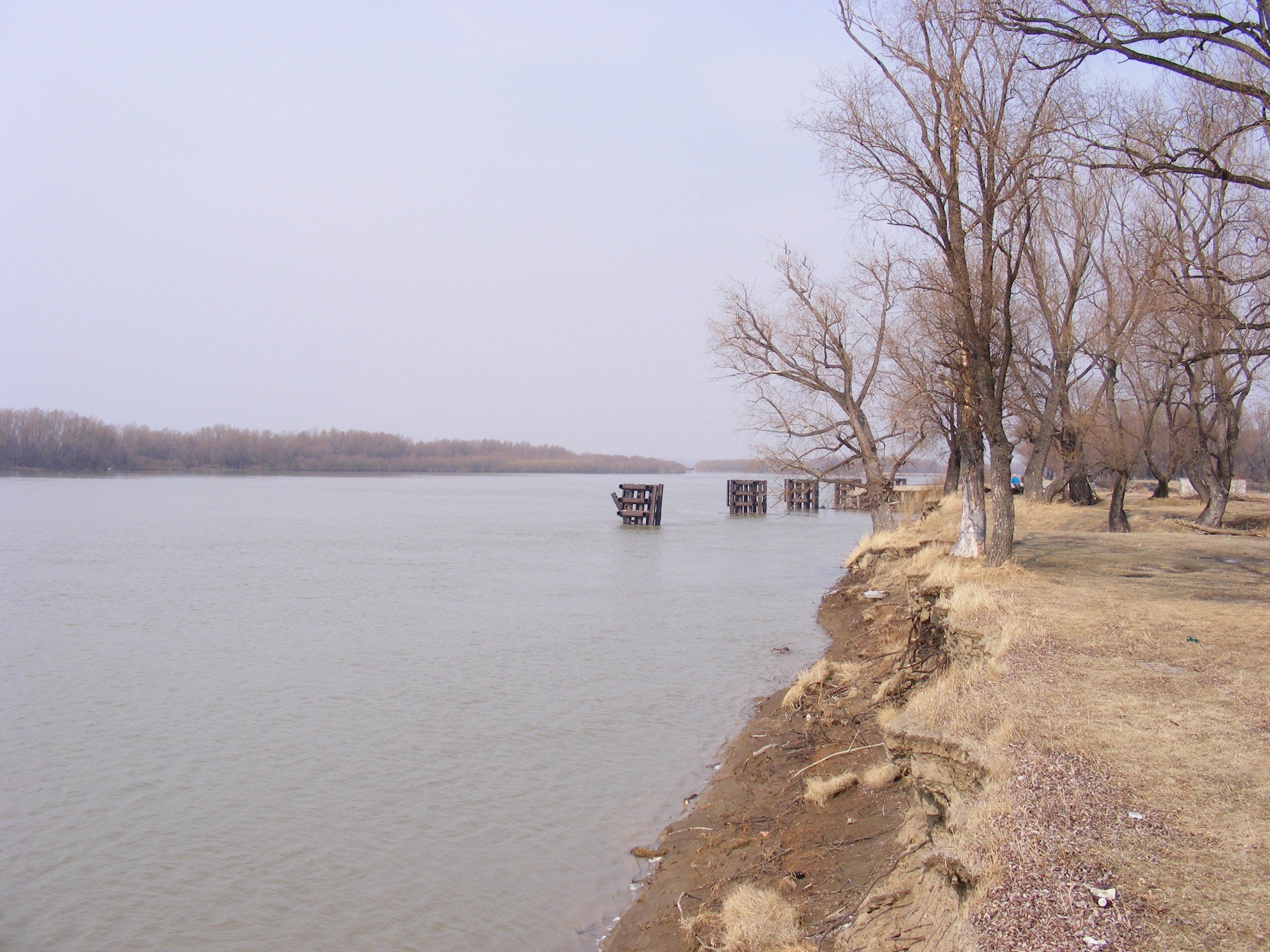 Krutaya Gorka, Omsk, Omskaya oblast', Russia, 644902